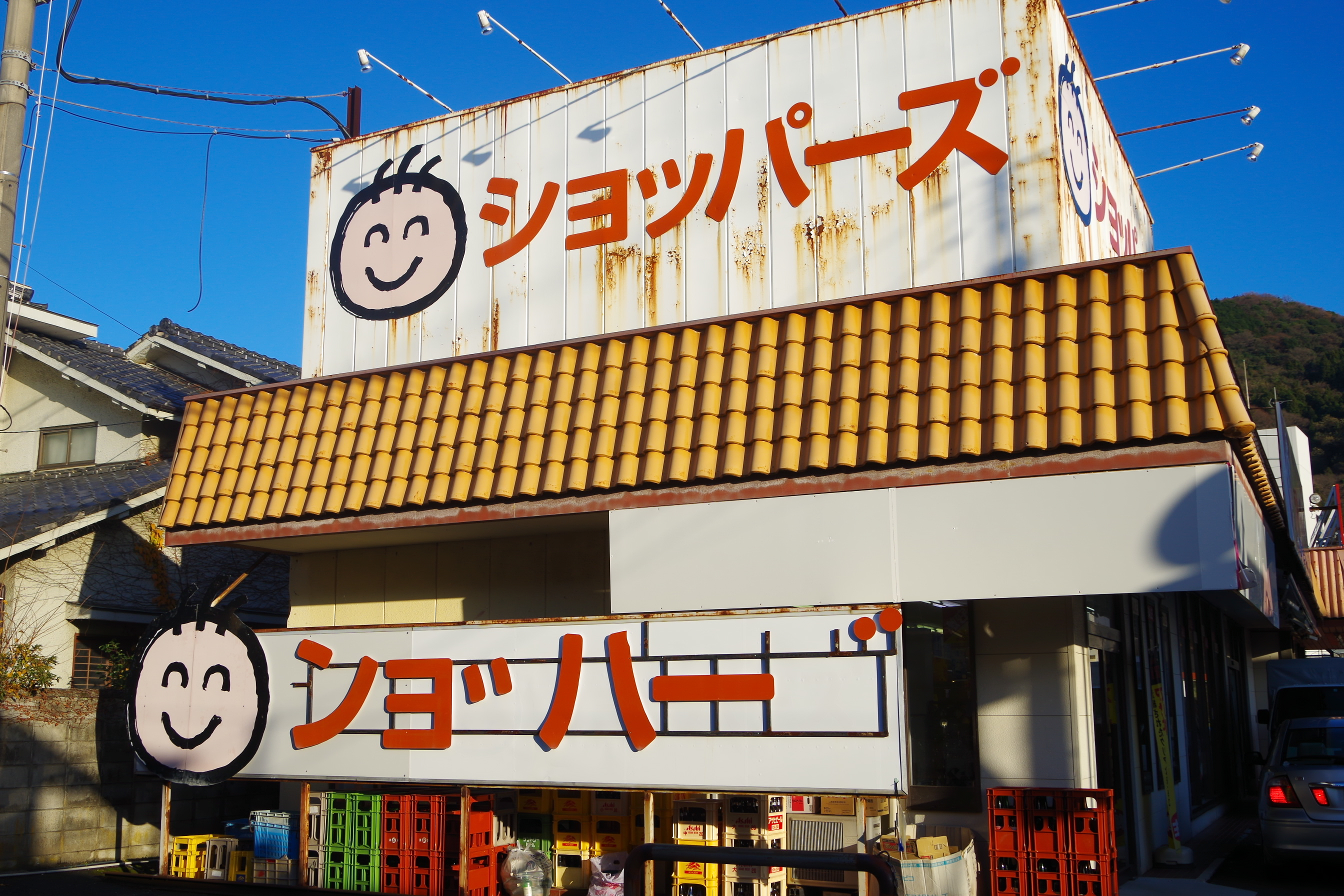 ショッパーズ長浜店の劣化により「ンョ゛ハー゛」と読める看板